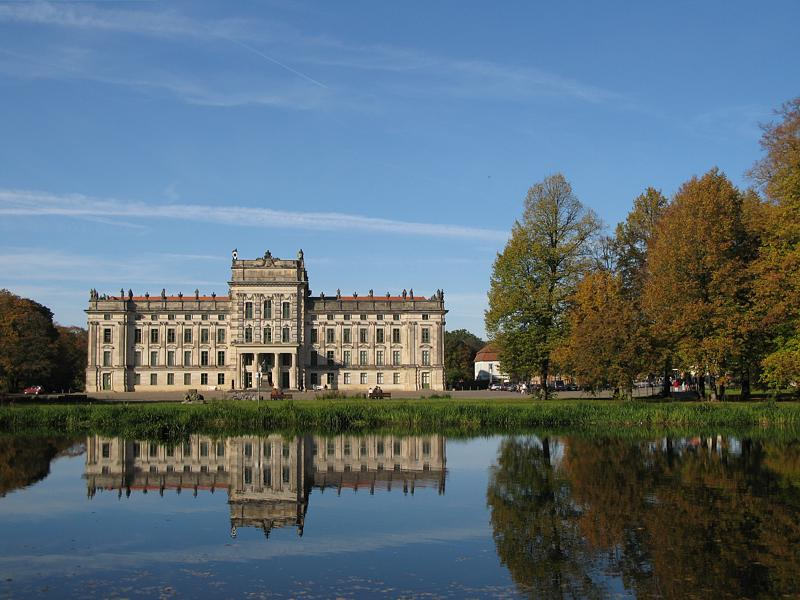 Schloss Ludwigslust von der Stadtseite aus gesehen